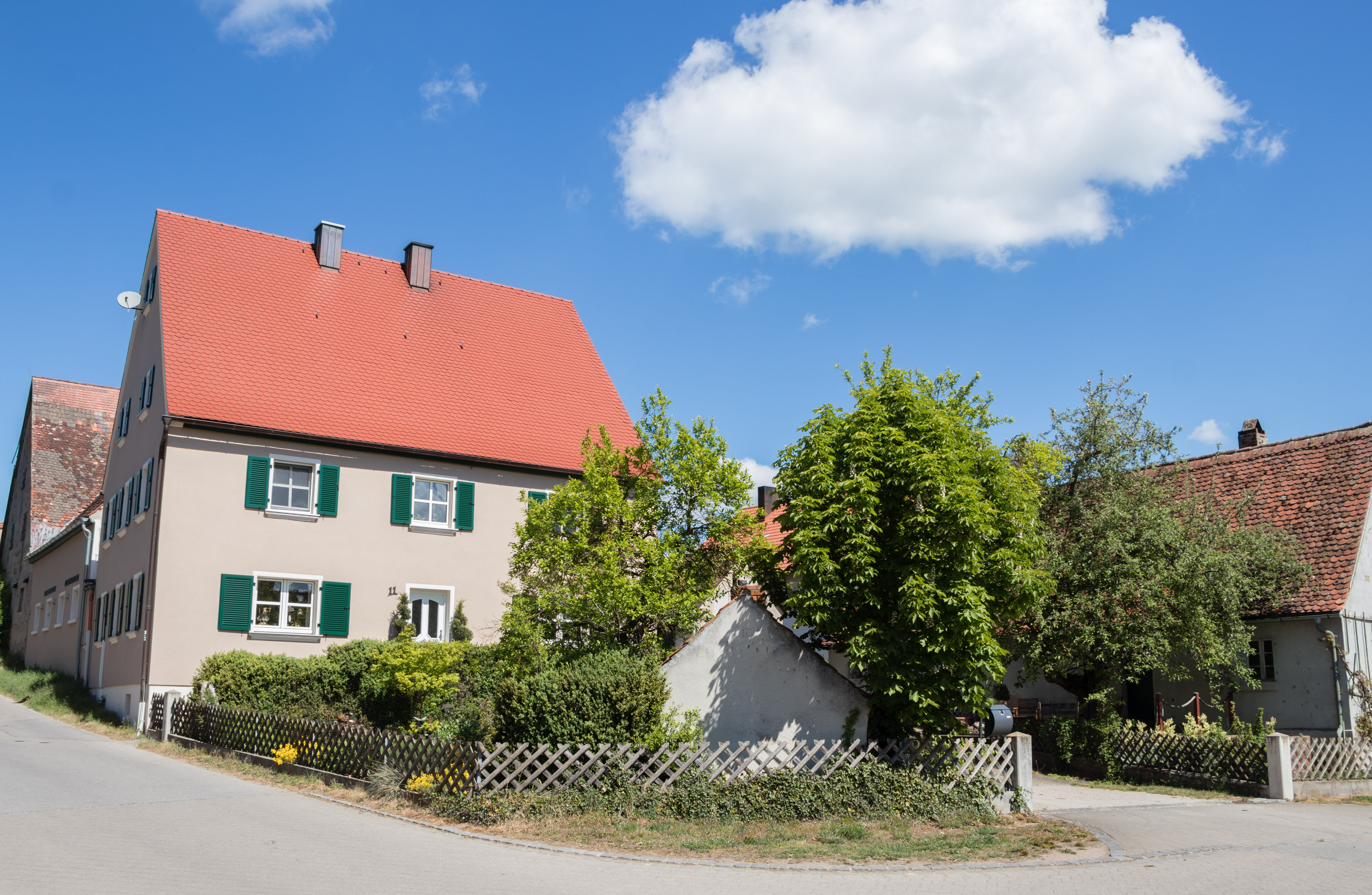 Ebersbach, Haus im Ortskern, Abenberg